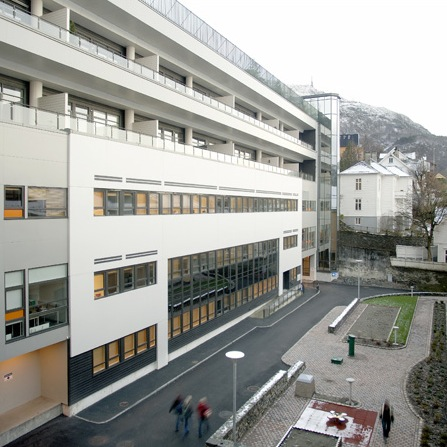 Framsiden av Bergen byarkiv i Kalfarveien 82, Bergen, Norway